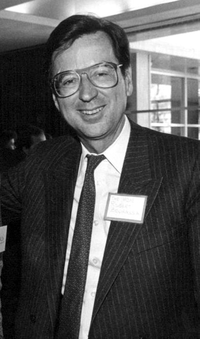 Robert Bourassa (1933-1996). Photo prise à une date non précisée. Il fut premier ministre du Québec de 1970 à 1976 et de 1985 à 1994.